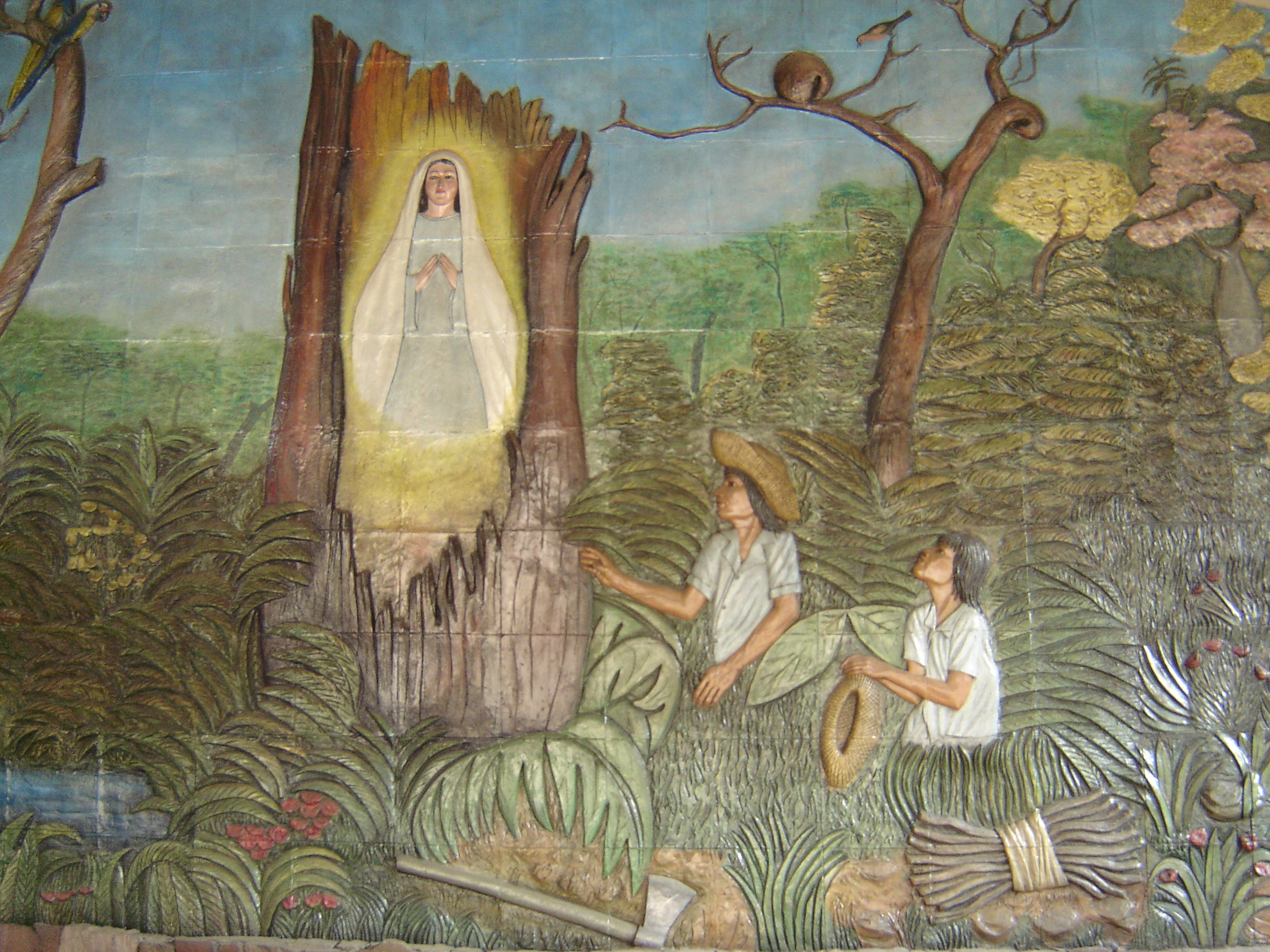 Runa Simi: Juk rikch'a Qullana Mariya Qutuqapi rikhurikusqanmanta willapaman jina, wiraqucha Germán García wankiykamayuk ruwaq.